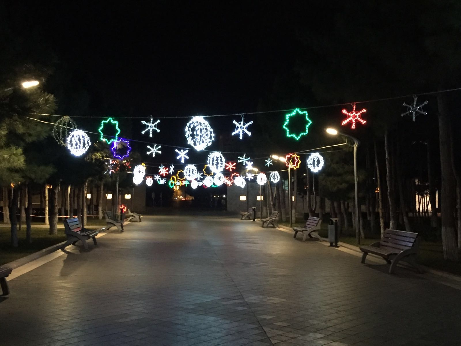 Парк гейдара алиева в Сумгайыте